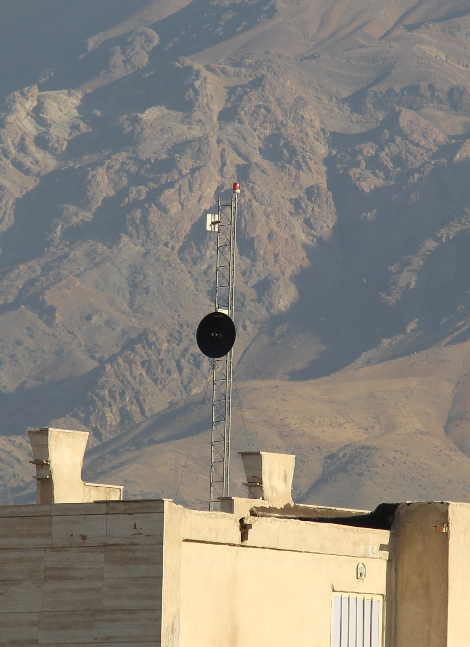 دکل وایرلس